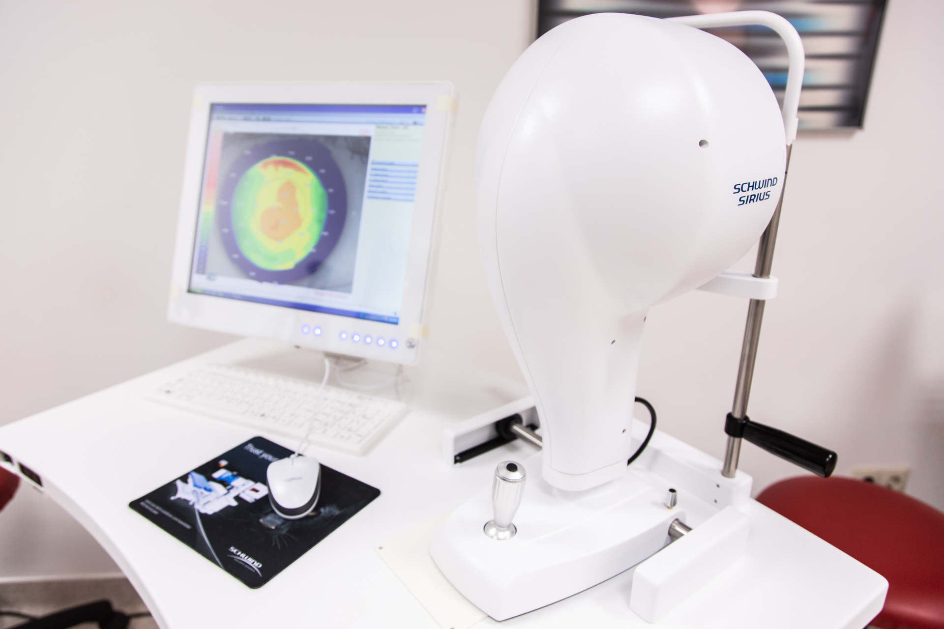 Schwind Sirius, hullámfront és topográfiás mérőeszköz. A képernyőn egy 3D szaruhártya térkép látható. A fájl által ábrázolt elemek: Schwind Sirius, hullámfront és topográfiás mérőeszköz, a hozzá tartozó monitorral, egérrel. Helyszín: Budai Szemészeti Központ, 1126 Budapest, Tartsay Vilmos utca 14.